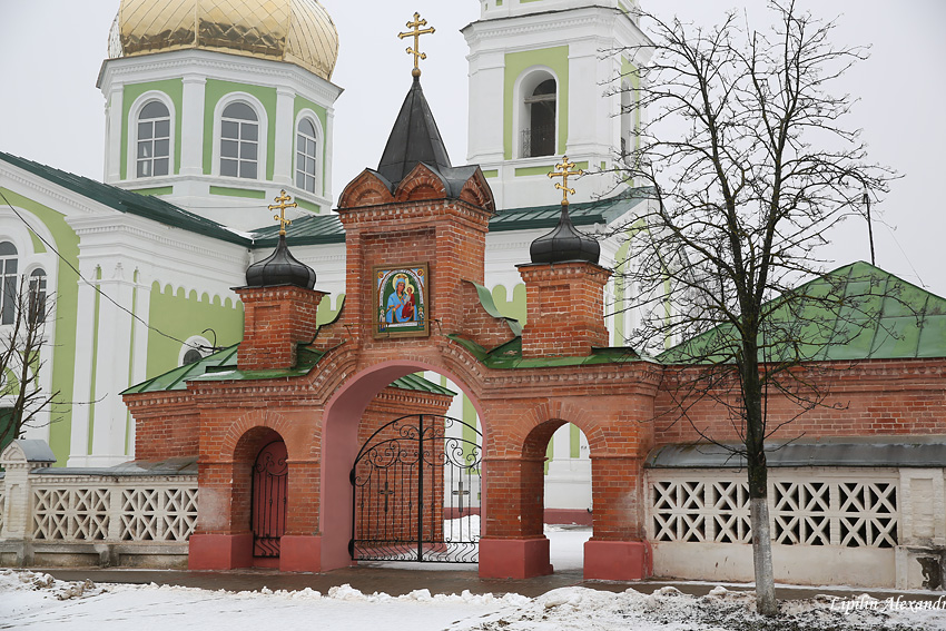 Мсціслаў. Царква Св. Аляксандра Неўскага